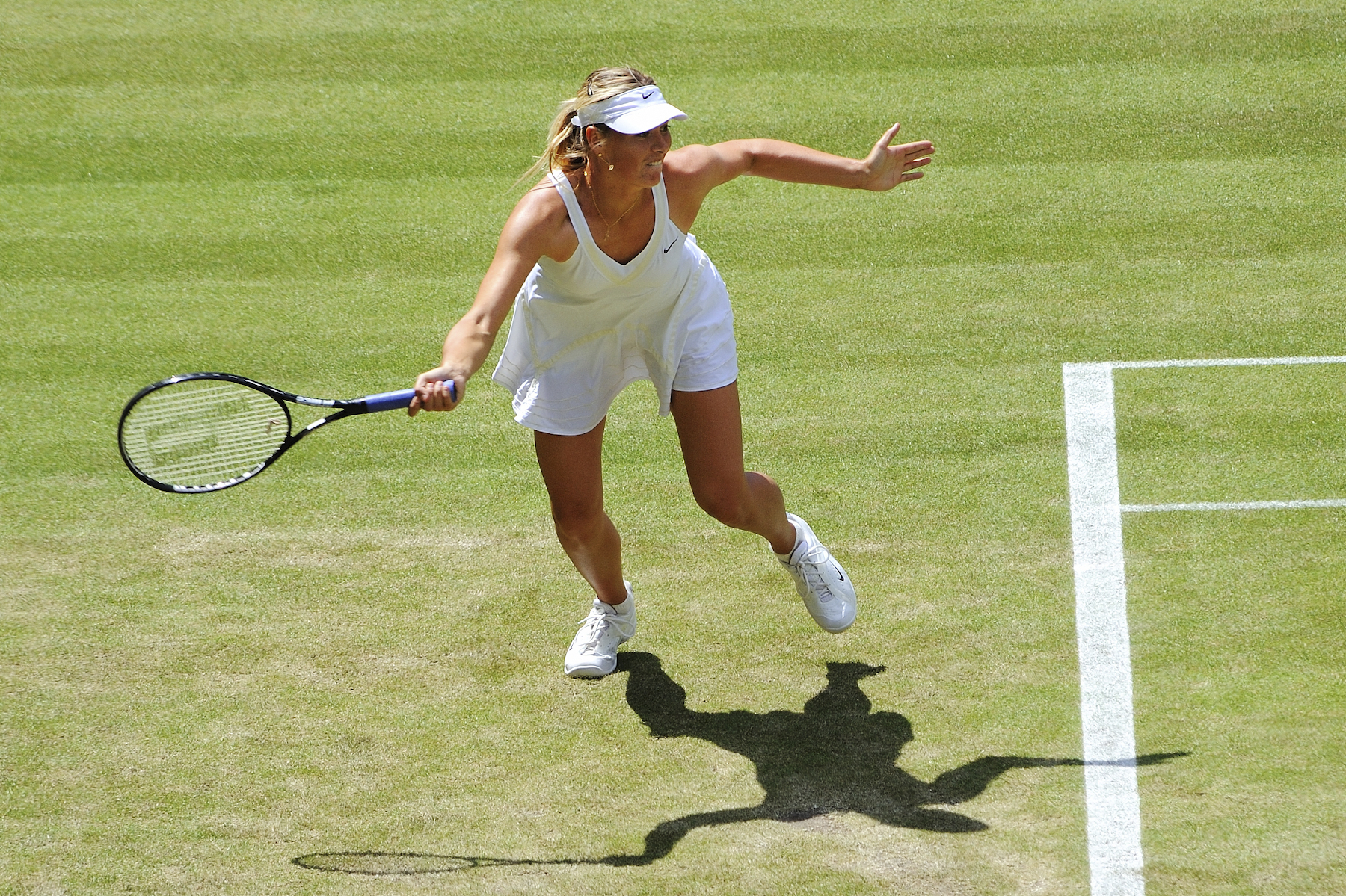 Maria Sharapova – Wimbledon 2009